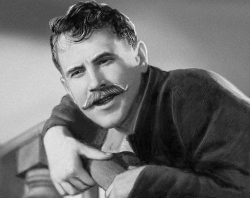 Актёр Борис Бабочкин в роли Чапаева в фильме «Чапаев»